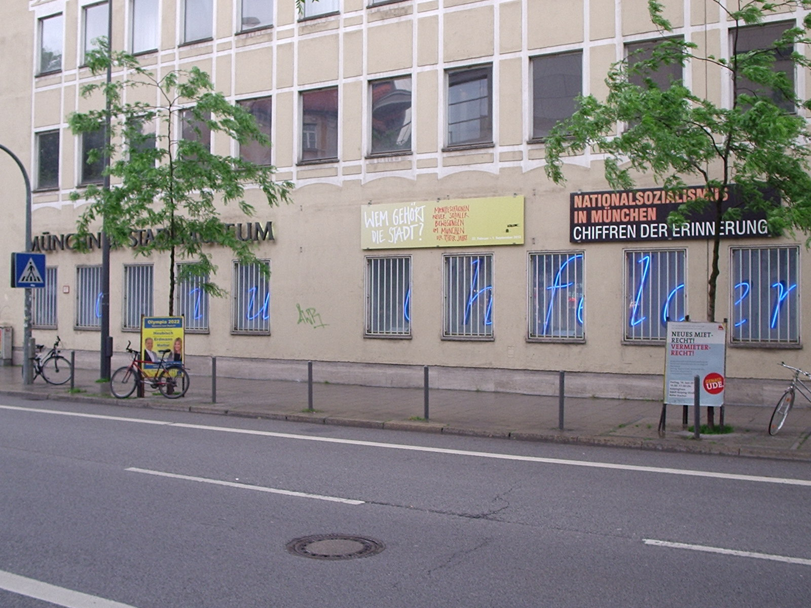 Leuchtschrift in den Fenstern des Stadtmuseums München Richtung Oberanger zur Erinnerung an das ehemalige Kaufhaus Uhlfelder, das an dieser Stelle stand.